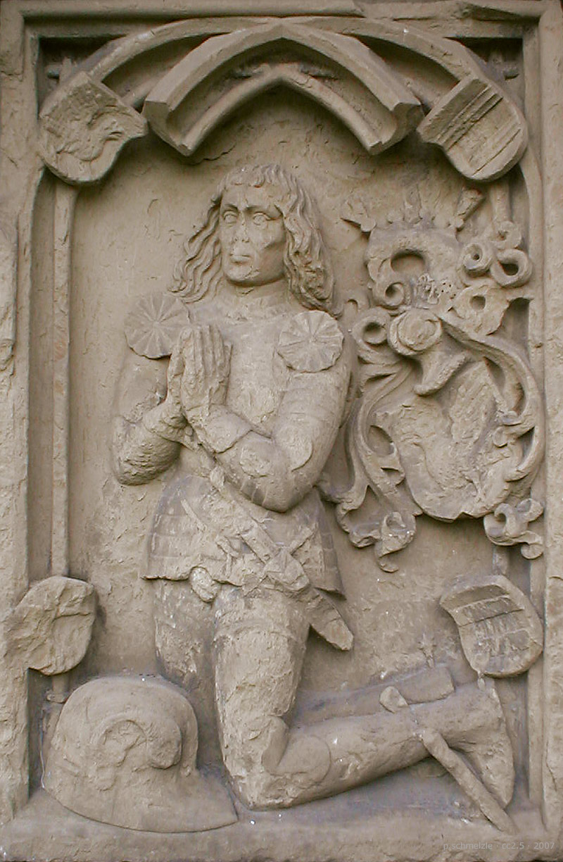 Historisches Grabmal (Göler von Ravensburg) an der evang. Kirche in Sulzfeld (Baden), Baden-Württemberg, Deutschland